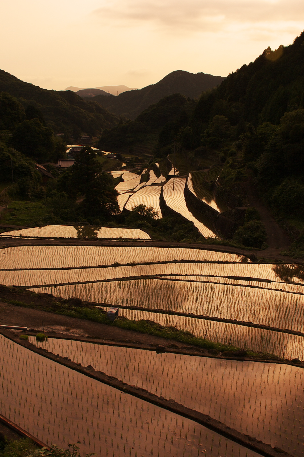 夕方の日向棚田